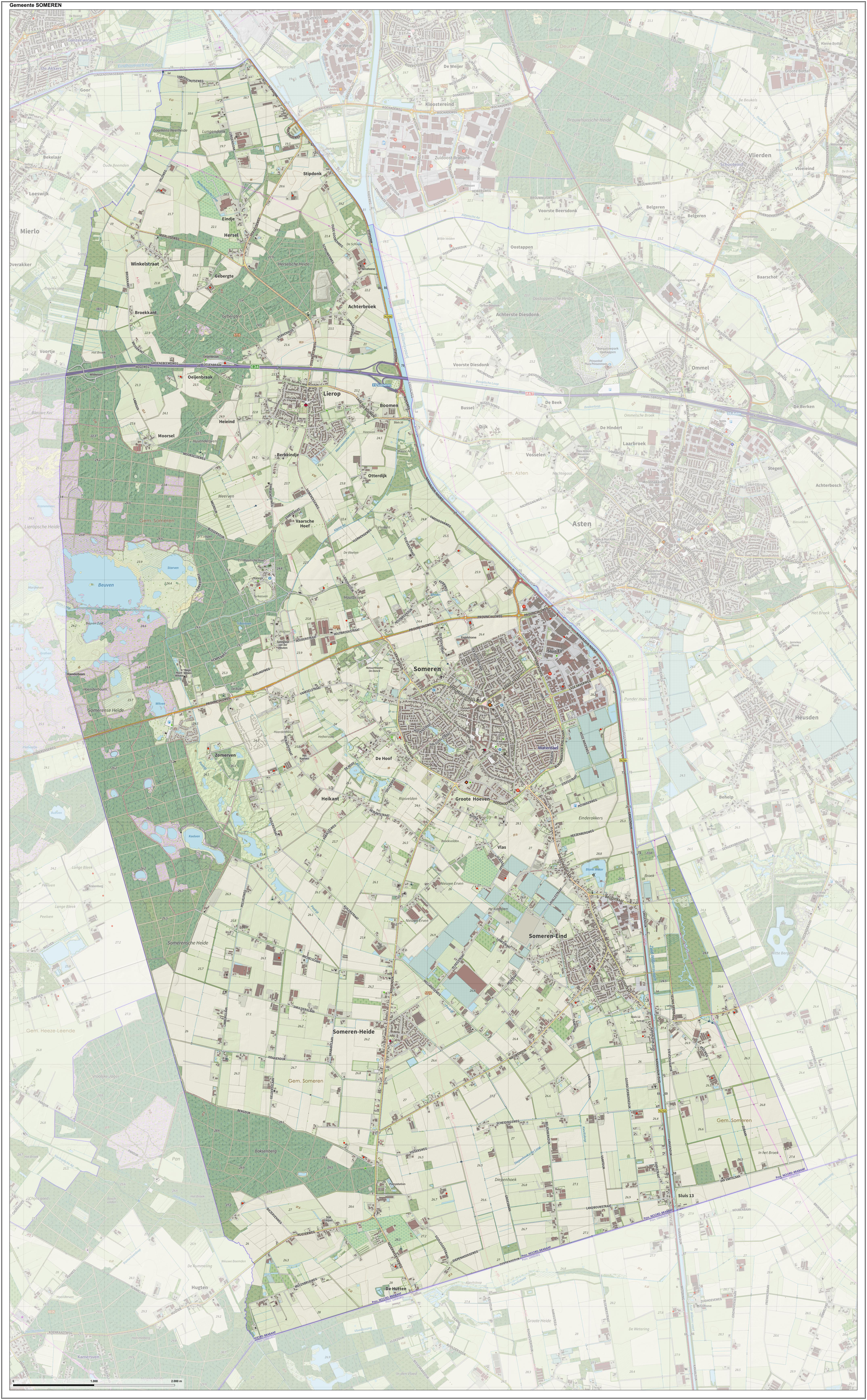 Topografische gemeentekaart. Resolutie: 400 pixels/km. Kaartbeeld samengesteld uit de open geodata van de Top10NL en Top25namen (Kadaster), Creative Commons-BY licentie. Gebouwvlakken uit open geodata BAG extract. Wegen uit de OpenStreetMap, OpenStreetMap community. Reliëfschaduw uit de Actuele Hoogtekaart AHN2. Samenstelling en kleurenschema: Jan-Willem van Aalst, met QGIS. Zie ook de Legenda.